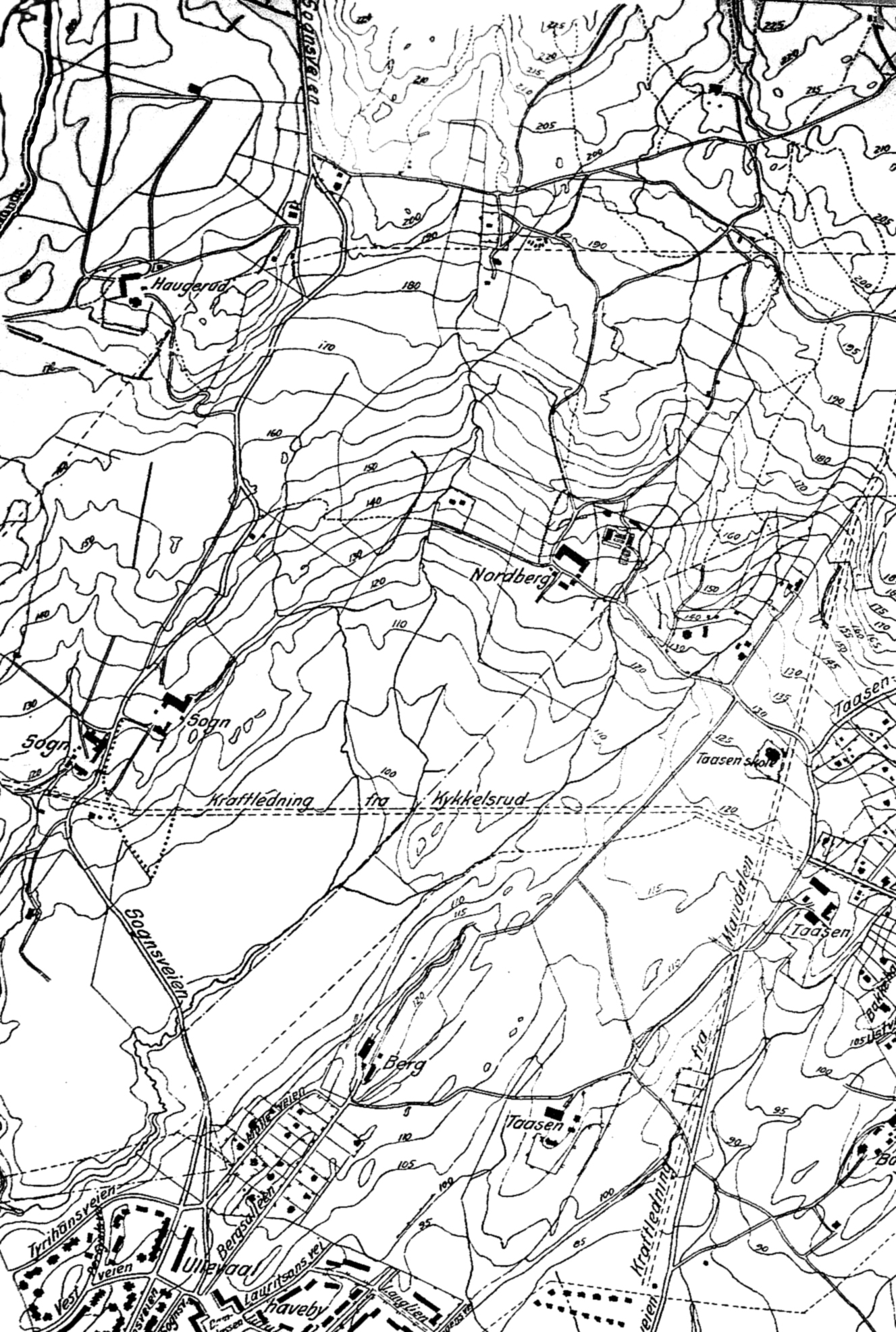 Utsnitt av kart; Sogn haveby før utbyggingen